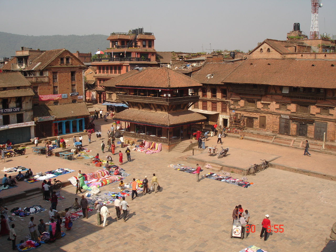 Taumadhi Square in Bhaktapur, Nepal. copyright santoshkc